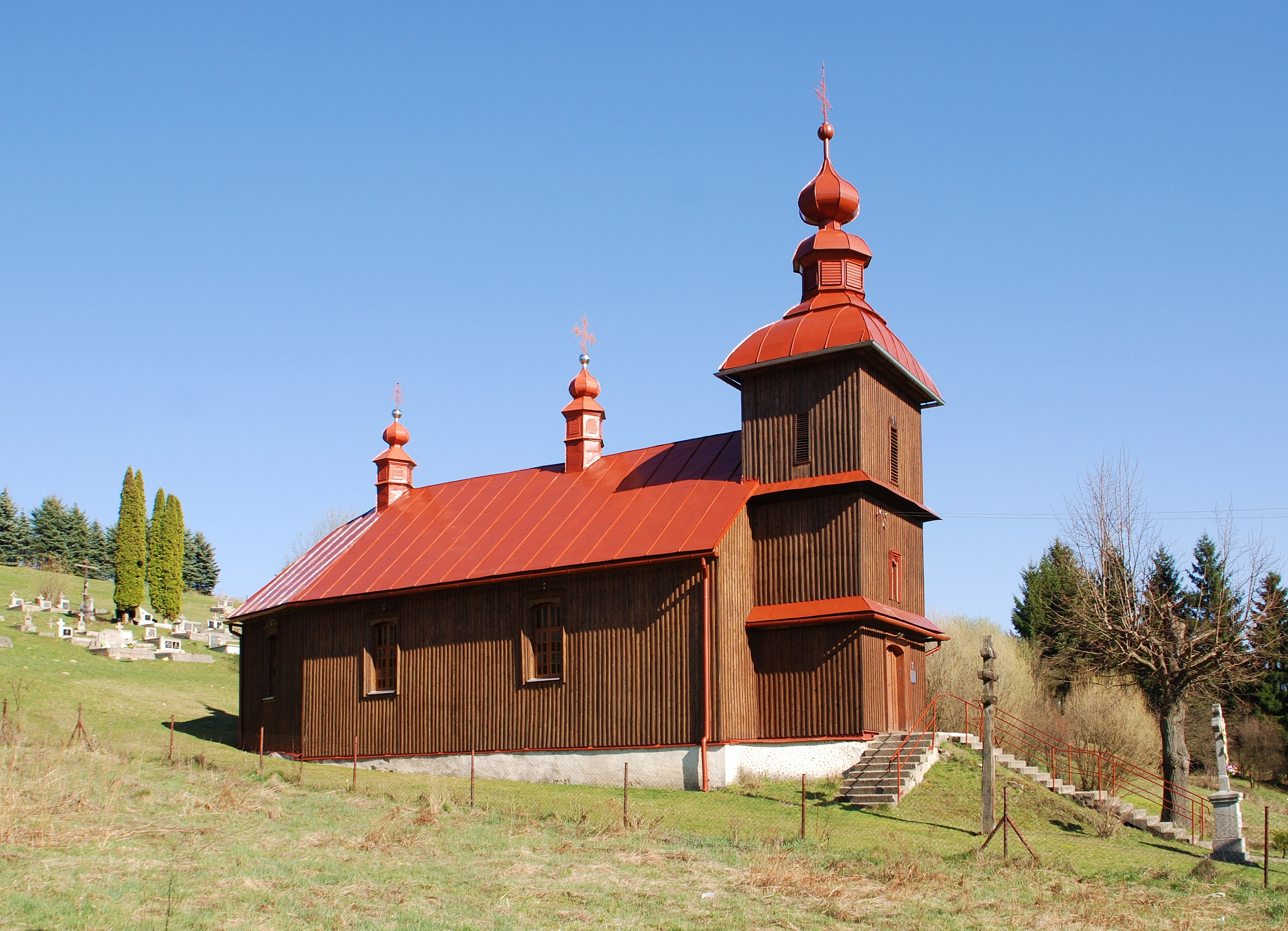 cerkiew